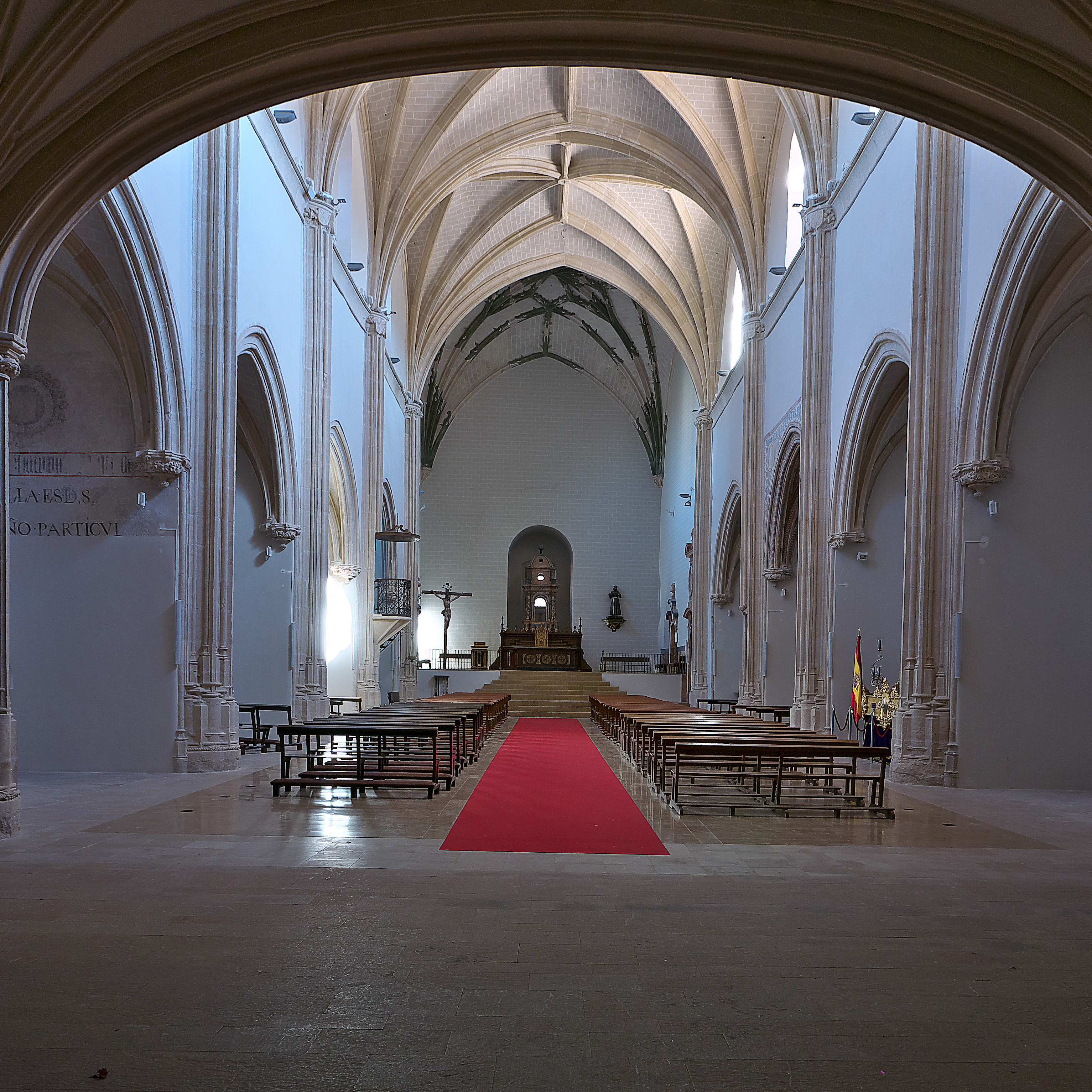 Íñigo López de Mendoza patrocina la construcción de la iglesia conventual, probablemente con Juan Guas.